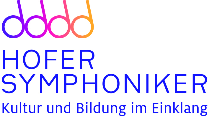 Logo der Hofer Symphoniker seit 2013